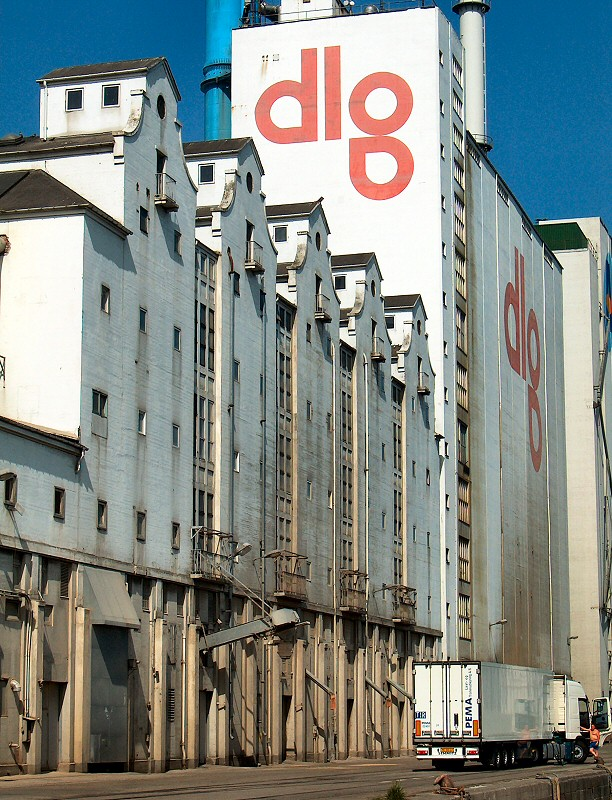 Dansk Landbrugs Grovvareselskabs (dlg) siloanlæg på Århus Havn kaldet "De fem søstre"